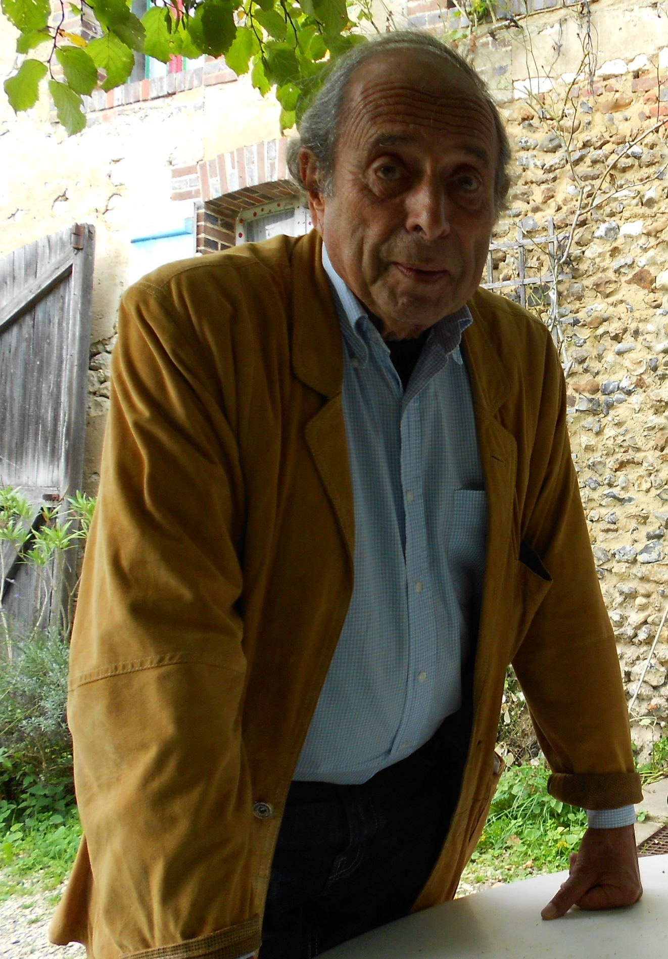 Le poète Jean-Clarence Lambert en 2013